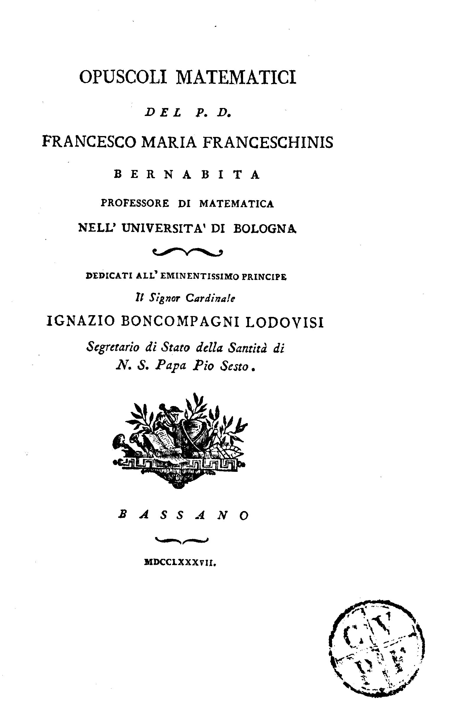 Opuscoli matematici del p.d. Francesco Maria Franceschinis bernabita professore di matematica nell'Università di Bologna …. - Bassano : [Giuseppe Remondini], 1787. - 134, [4] p., [3] c. di tav. ; 8º .